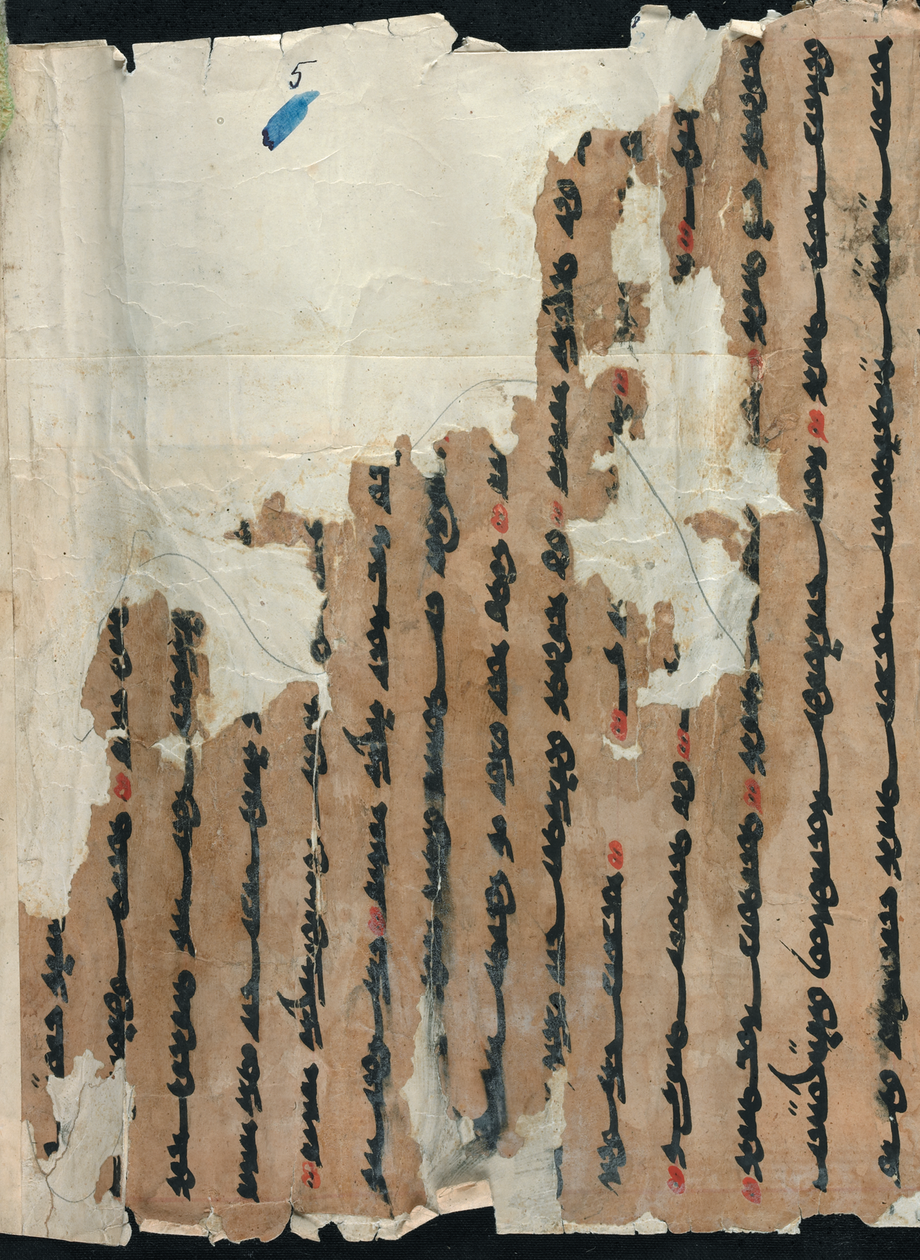 Первый лист рукописи SI D1 (SI 3159) из коллекции СПб ИВР РАН. Содержит манихейский уйгурский текст (Хуастванифт) Xuastvanift. Рукопись предположительно XI века. Начало отсутствует.